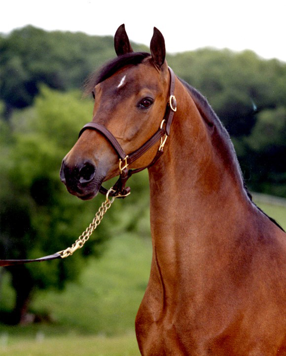 Morgan horse